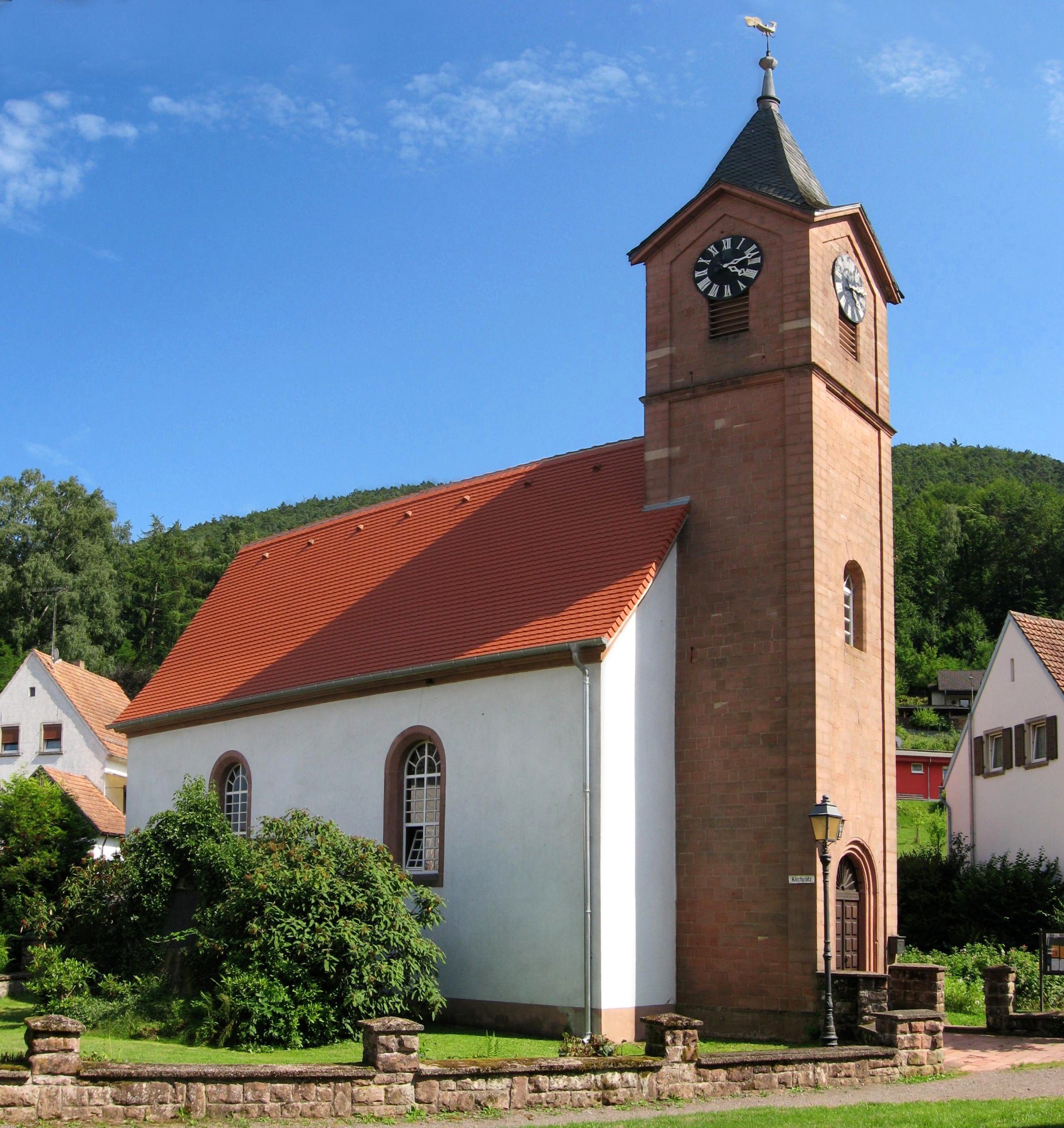 Evangelische Kirche in Nothweiler, Baudenkmal